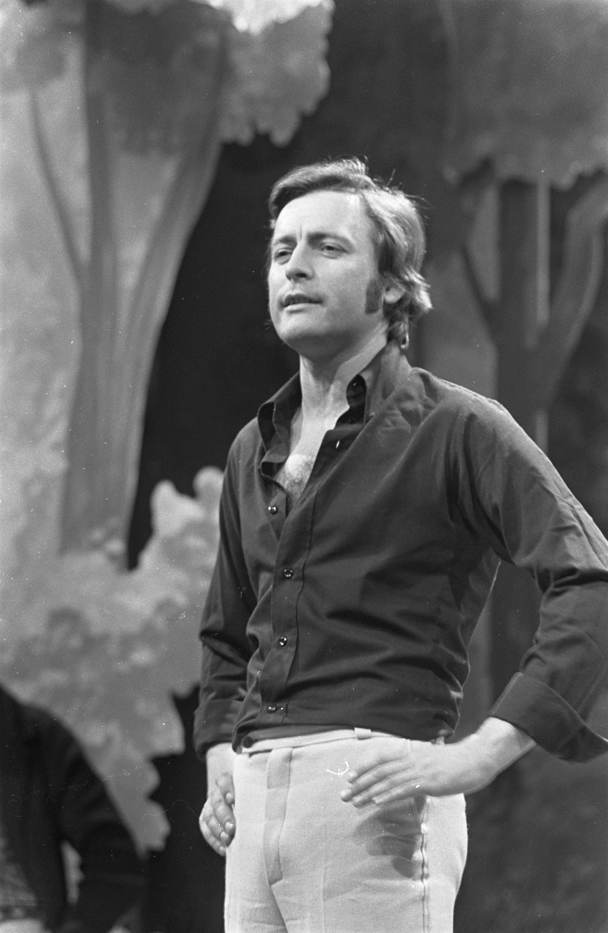 Collectie / Archief : Fotocollectie Anefo Reportage / Serie : TV-programma "Zoals de ouden zongen, piepen de jongen" Beschrijving : Productieleider Rob Touber Datum : 4 oktober 1968 Trefwoorden : TV-programma's, portretten, producenten Persoonsnaam : Touber, Rob Fotograaf : Fotograaf Onbekend / Anefo Auteursrechthebbende : Nationaal Archief Materiaalsoort : Negatief (zwart/wit) Nummer archiefinventaris : bekijk toegang 2.24.01.05 Bestanddeelnummer : 921-7384